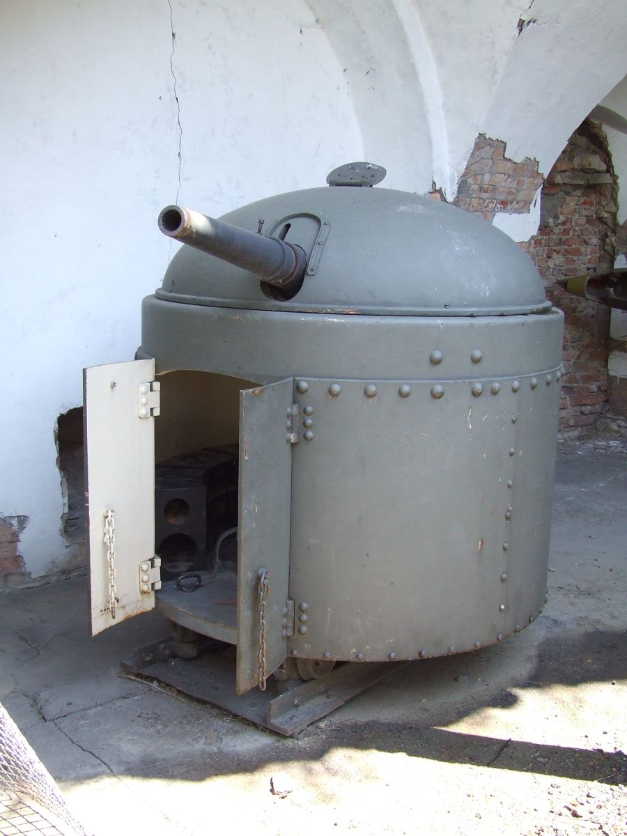 Fahrpanzer, Fort IX Czerniaków Warszawa